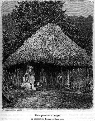 Megrelian hut "patskha"